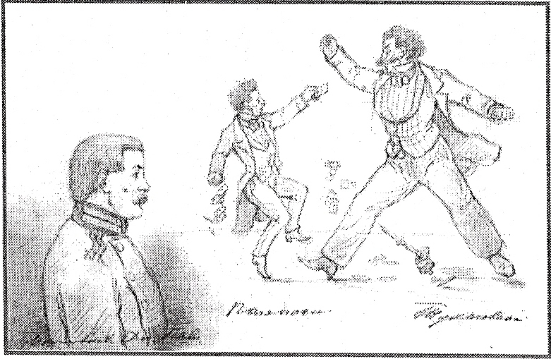 Рисунок из анонимного альбома 1850-х годов с изображением членов окружения орловского губернатора Сафоновича